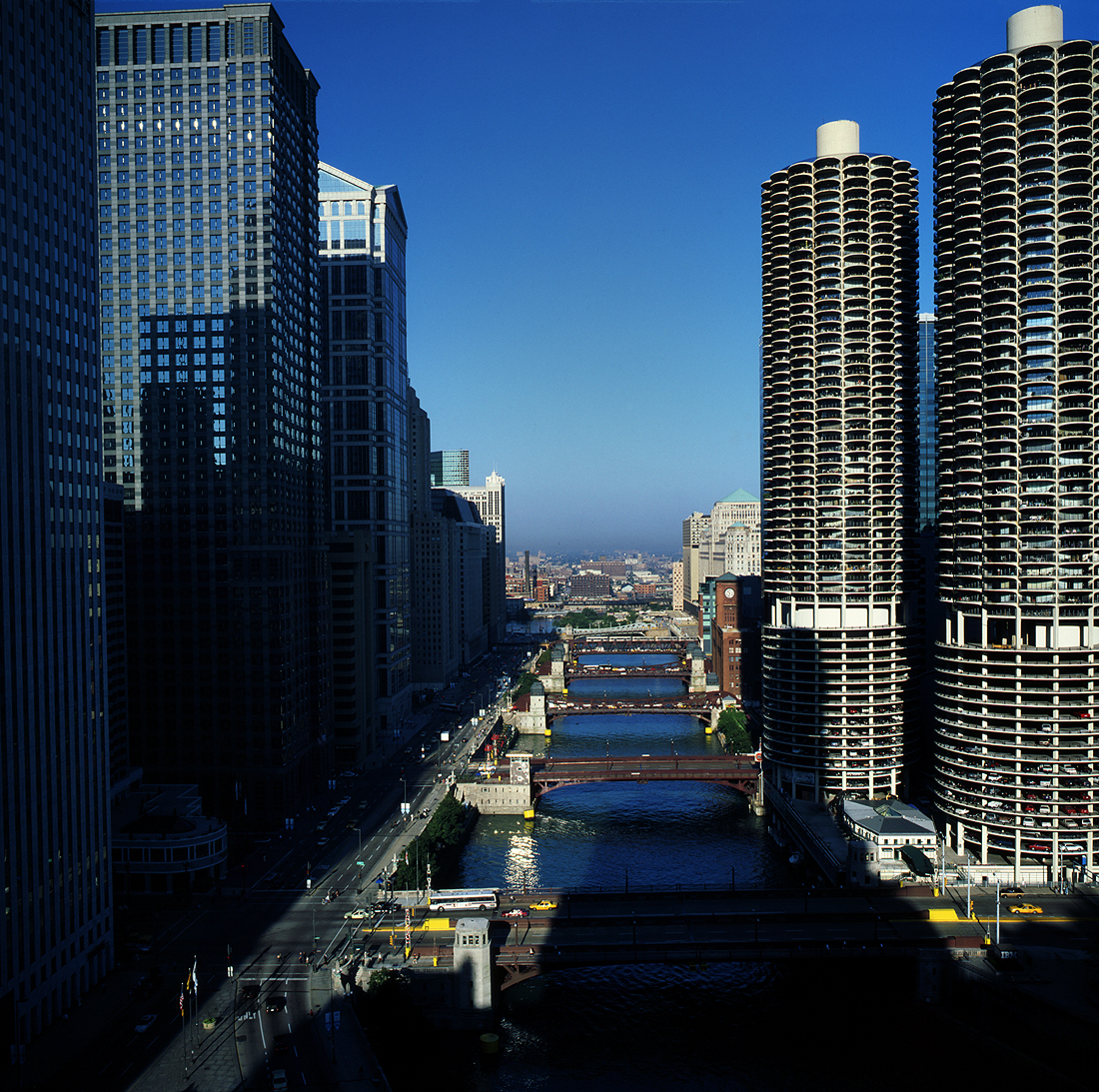 Chicago River vanuit een hotel